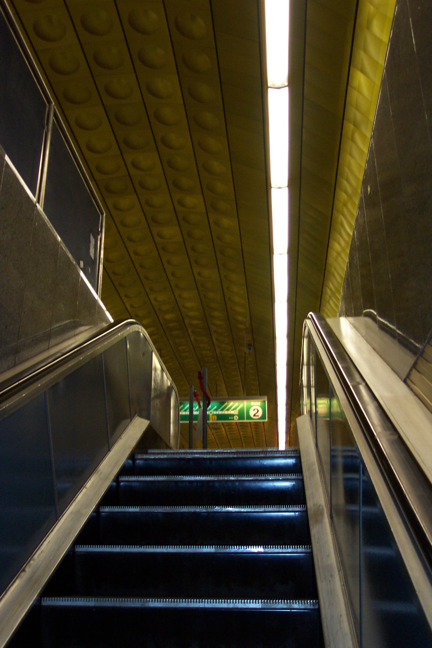 Metro station Můstek - Stanice metra Můstek